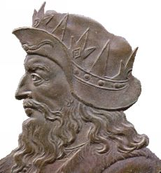 Auteur Dassier, Jean (1676-1763 ; médailleur) Titre Médaille Publication [Paris], [ca 1720] Description : bronze ; 31 mm ; 15,75 g Licence: GPL et GFDL Notes Acq. 95-0631 Cote : BNF Richelieu Monnaies, médailles etantiques exemplaire unique L'ensemble est conservé dans deux boîtes cylindriques en buis. Tranche cannelée Identifiant 07700002 Détail du contenu : No d'image 1 Titre Clodion roy de France. Cette même image est aussi utilisée (sur wikipedia) pour représenter Mérovée. Notes 1720 Sujet(s) Clodion le Chevelu (+ 447 ; chef des Francs saliens) Modifié par Rinaldum 11 jan 2004 à 22:36 (CET) Trouvé sur le site Gallica de la BNF